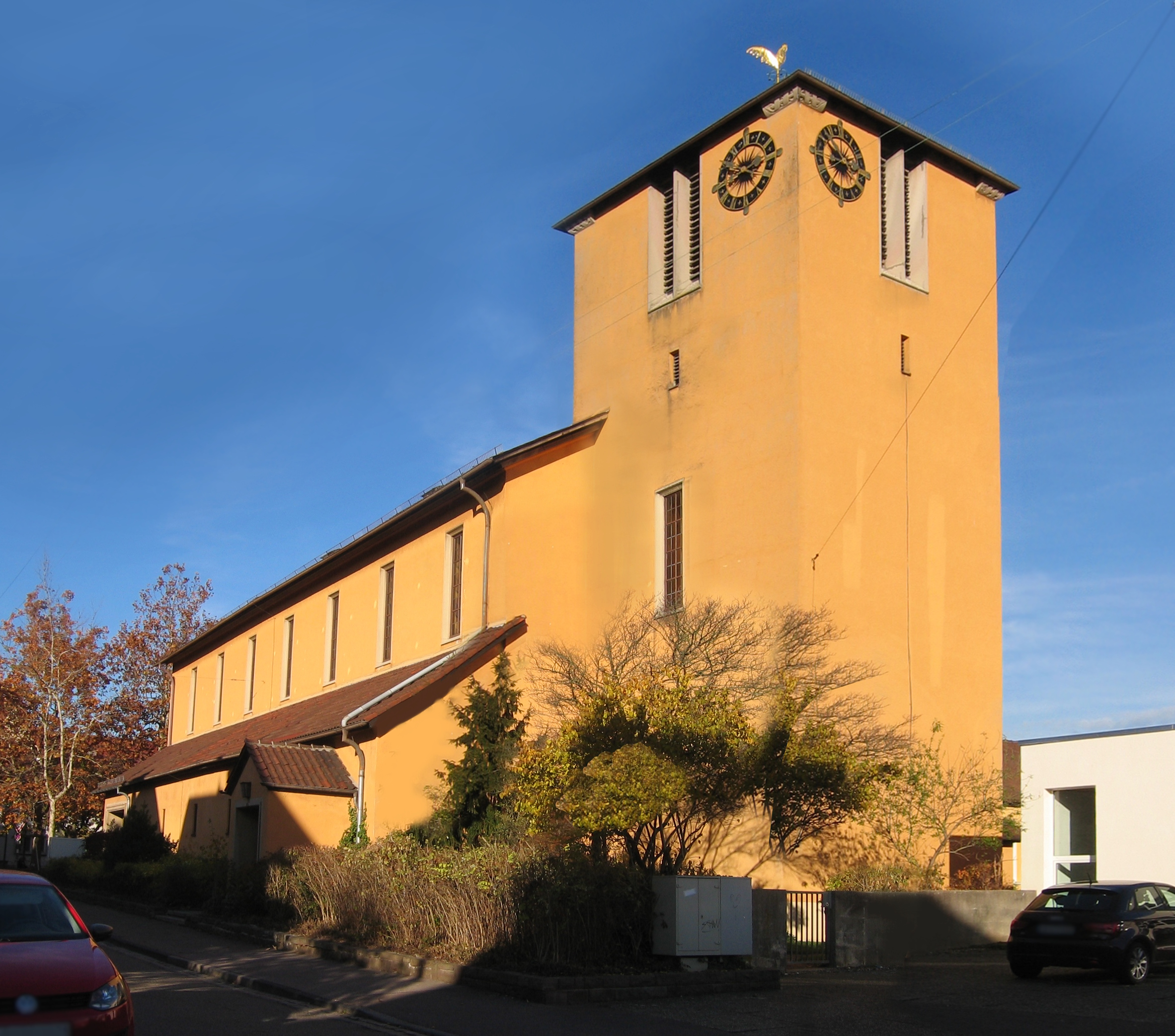 Erlöserkirche Ludwigsburg, Osterholzallee, Johannisstraße